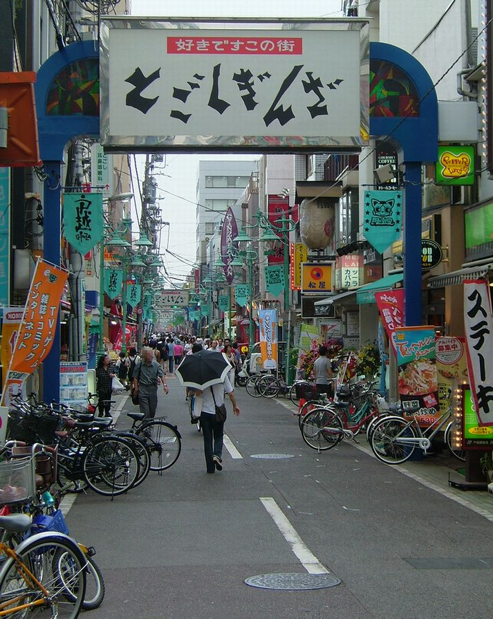 戸越銀座商店街（東京都品川区）投稿者が2007年7月28日に撮影